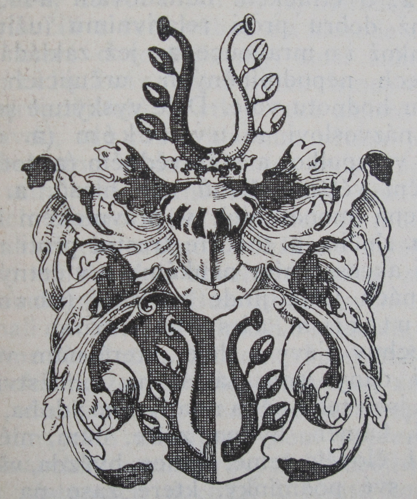 Původní popisek: Č. 30. Znak rodu Absolona z Ledské.